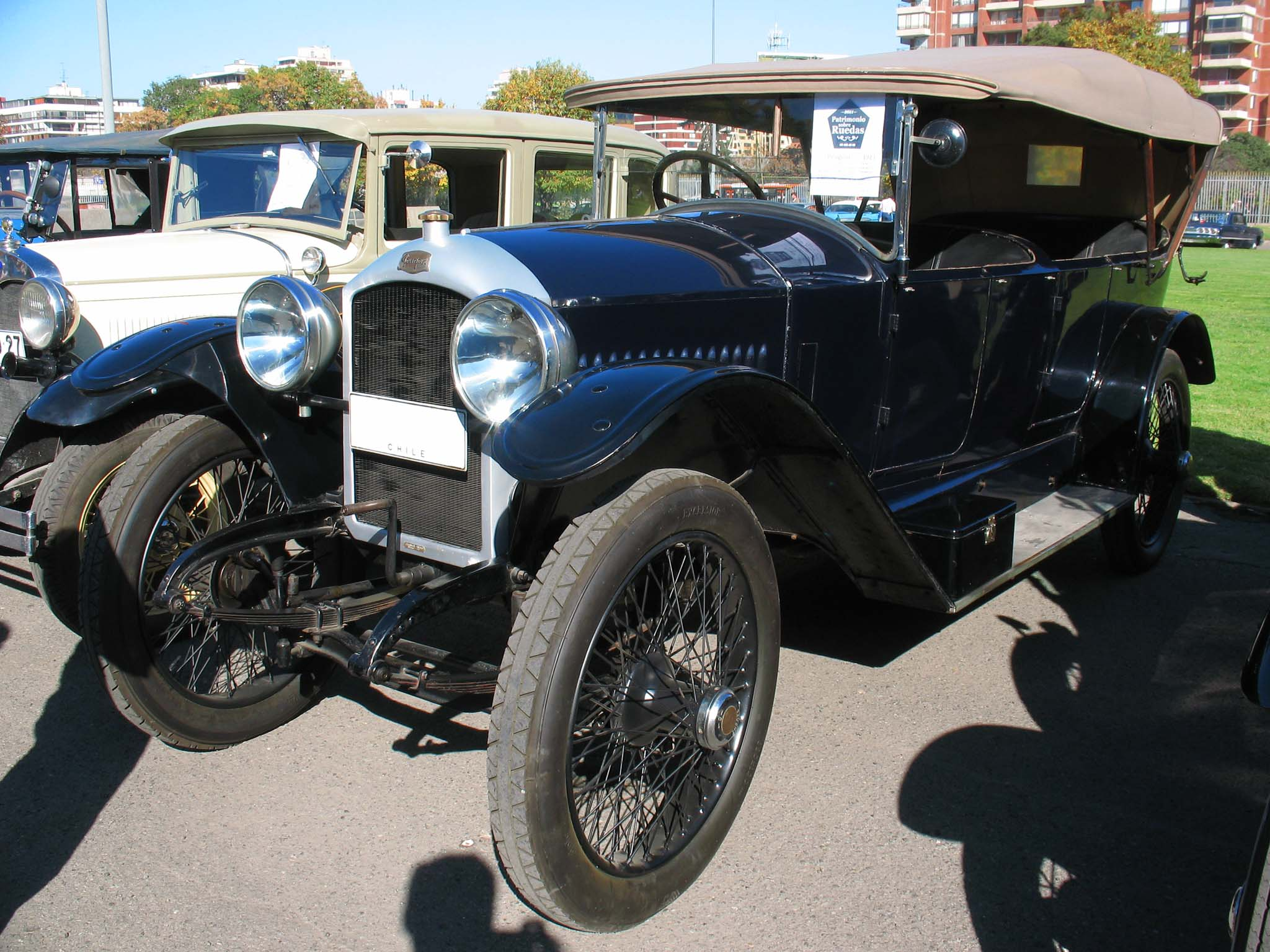 Type 153 Phaeton 1923